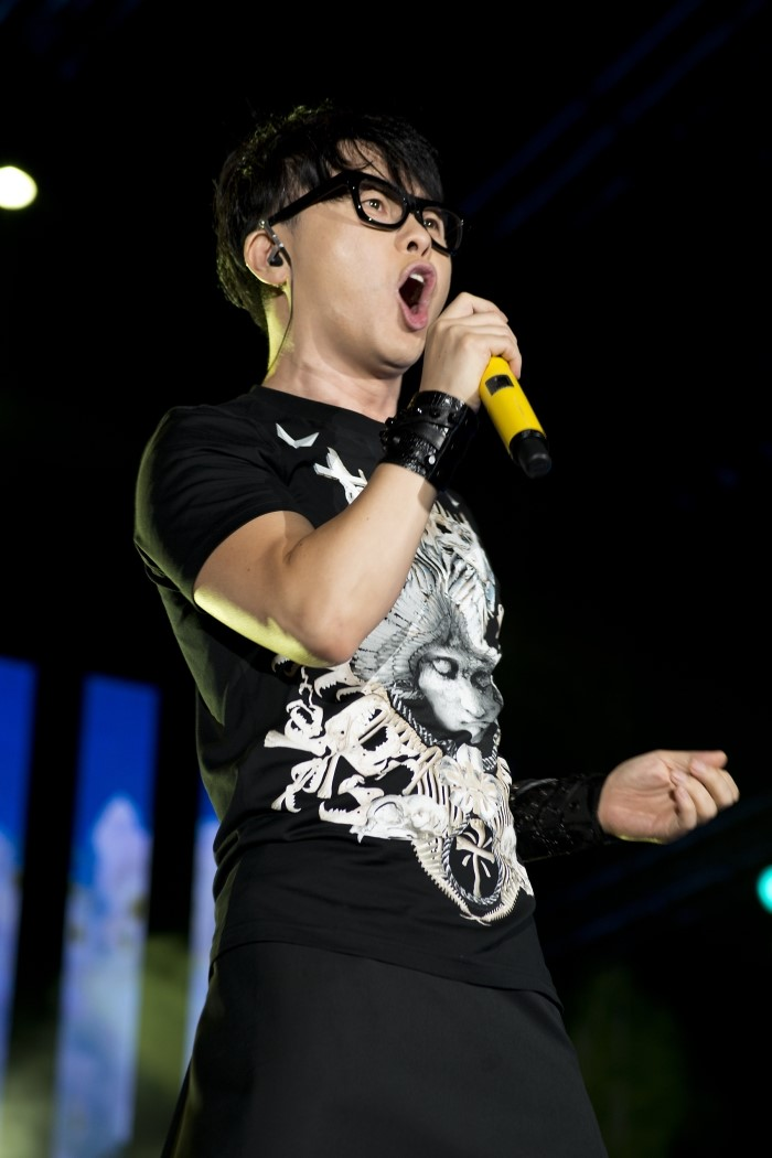 가수 이승환